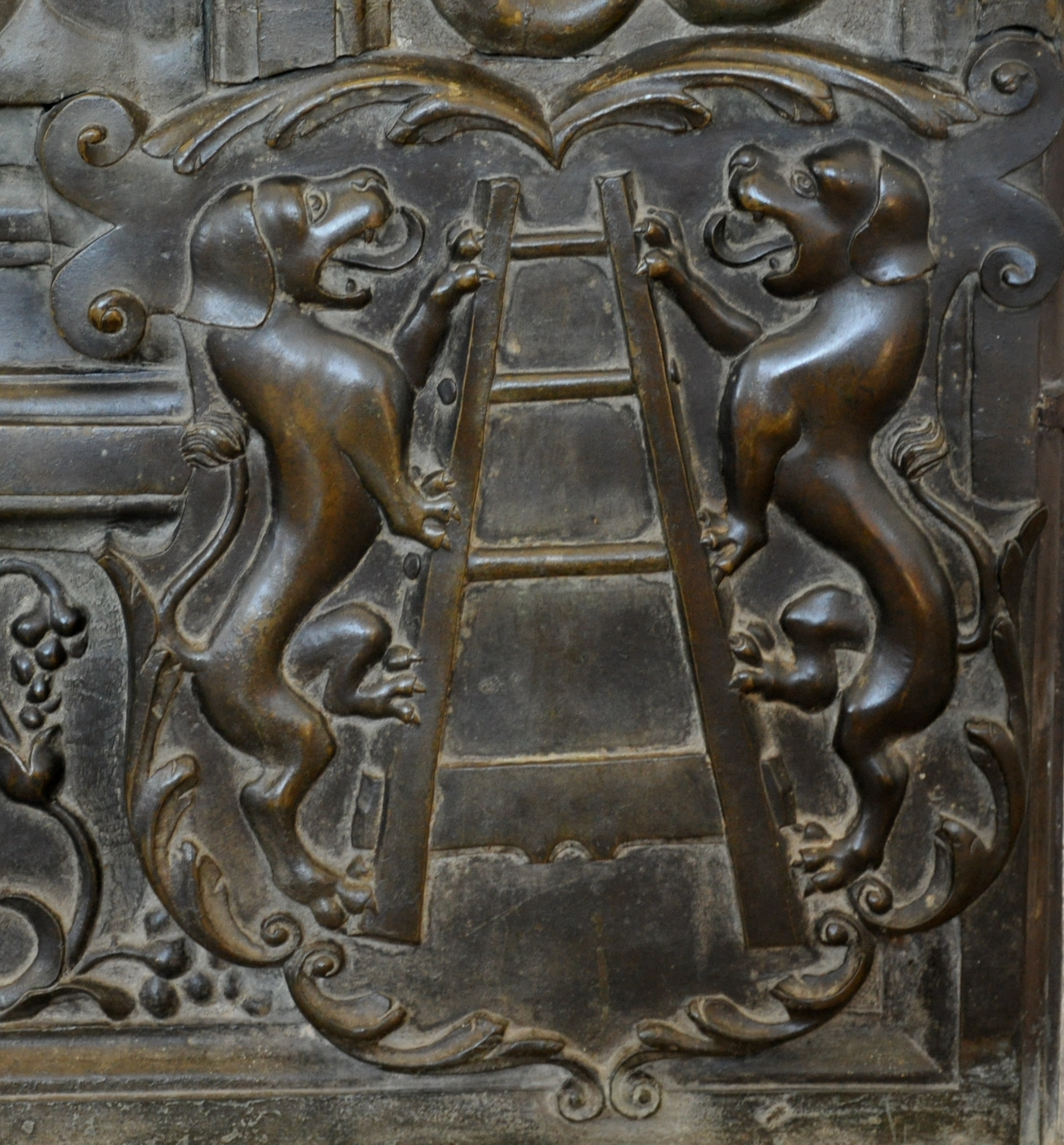 Meßkirch, Pfarrkirche St. Martin, Epitaph Gottfried Werner von Zimmern, Ahnenprobe rechts unten, Wappen Leiter (Scaliger)